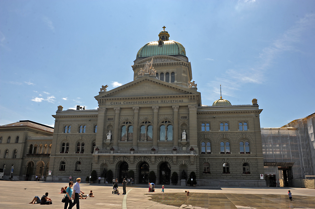 Bundeshaus